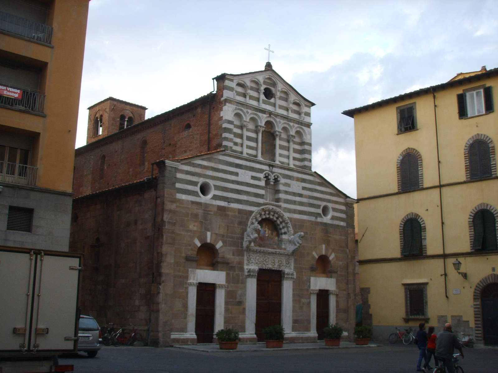 Chiesa di san giusto